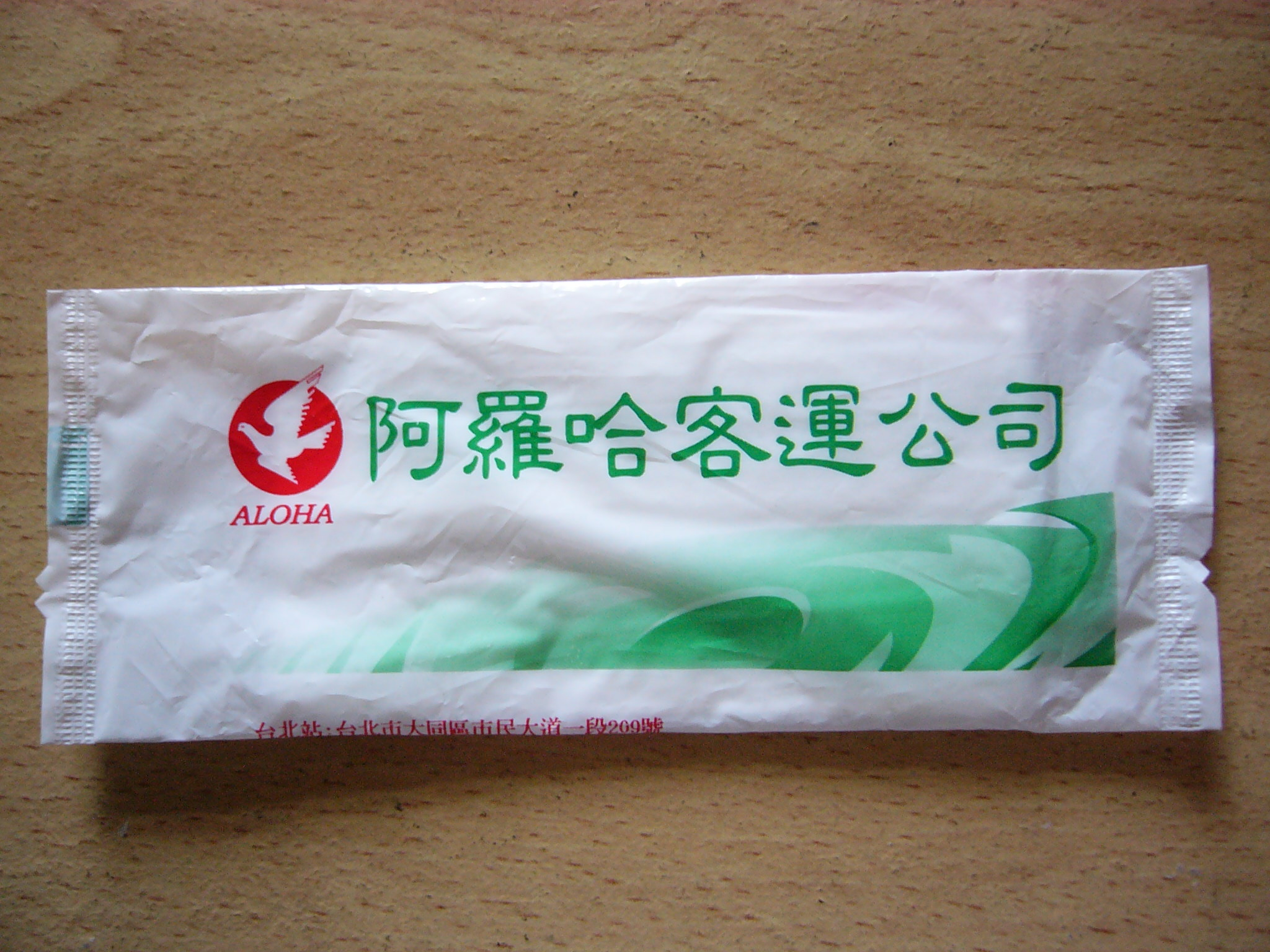 阿羅哈客運濕紙巾，製造日期為2010年8月6日。